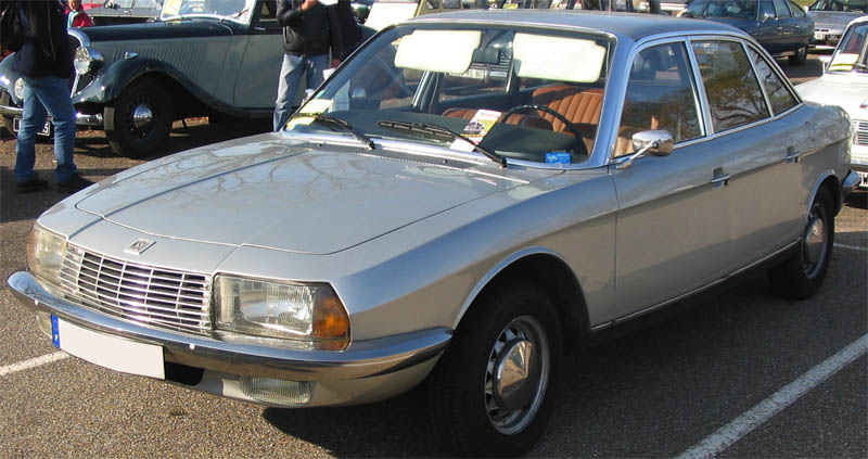 automobile NSU Ro 80 photographiée lors d'une rassemblement automobile